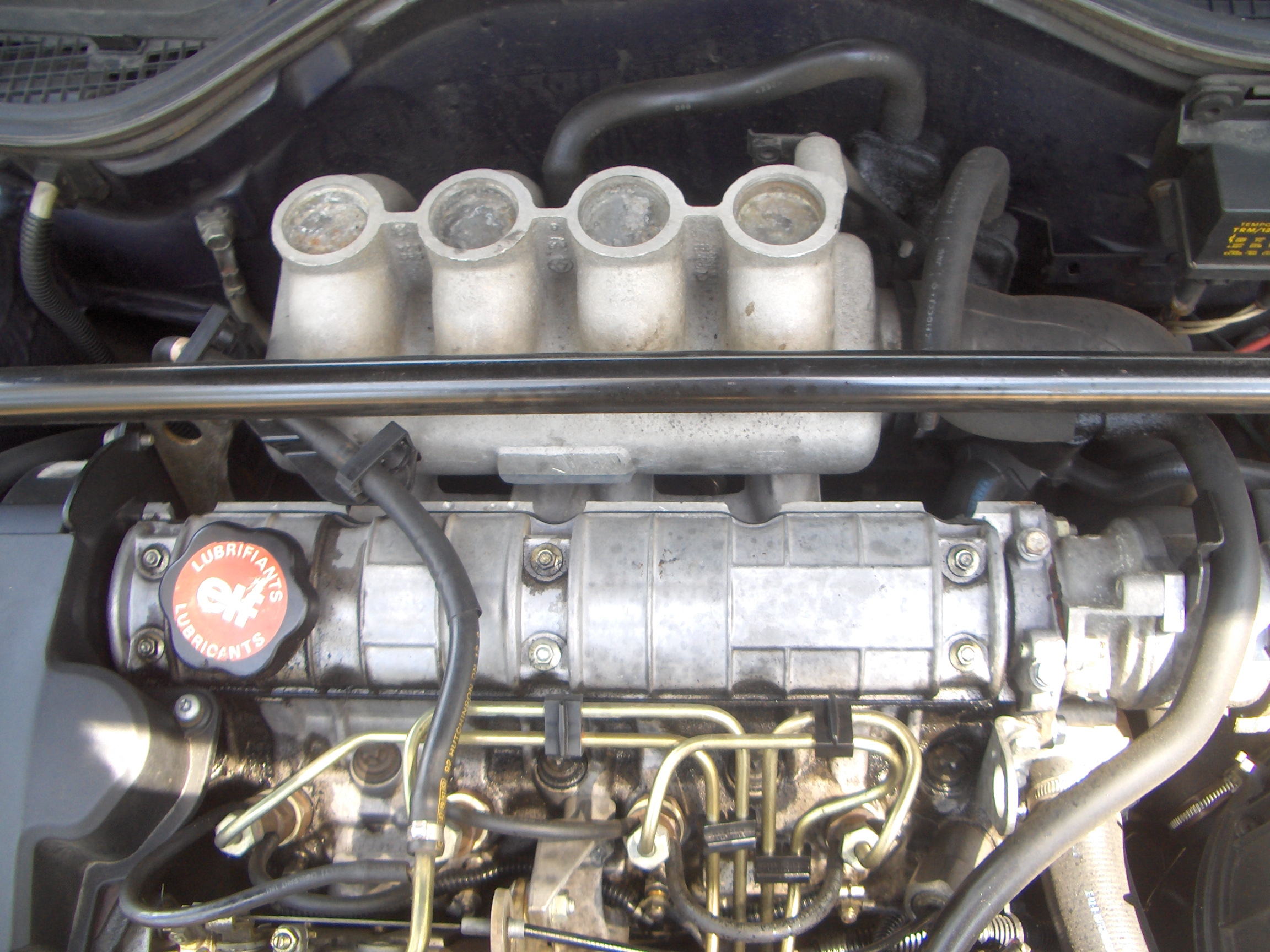 moteur F8Q 1.9 litre diesel Renault (1992)